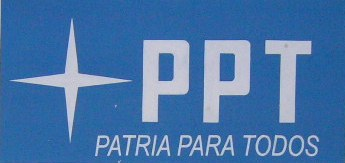 PPT logo (Venezuelan political party)